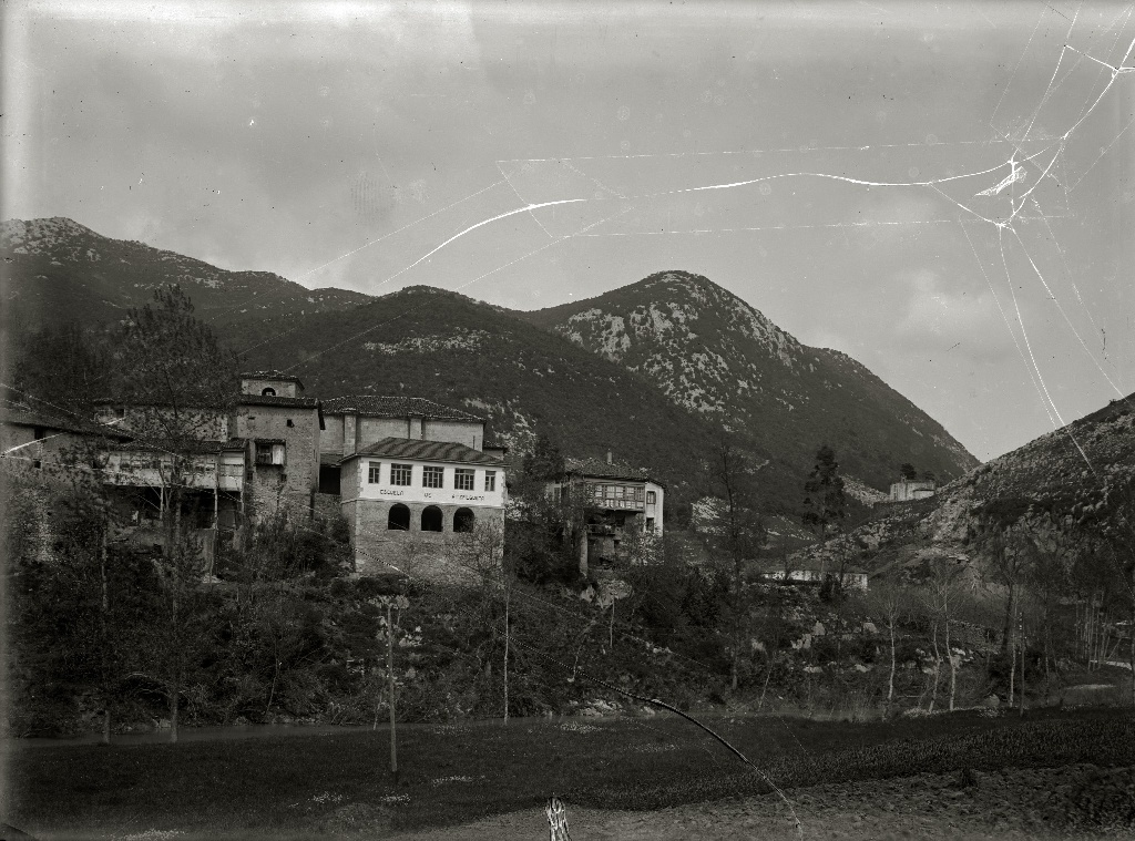 Título original: Vista de la localidad de Mendaro (1/1) Localización: Mendaro (Guipúzcoa)